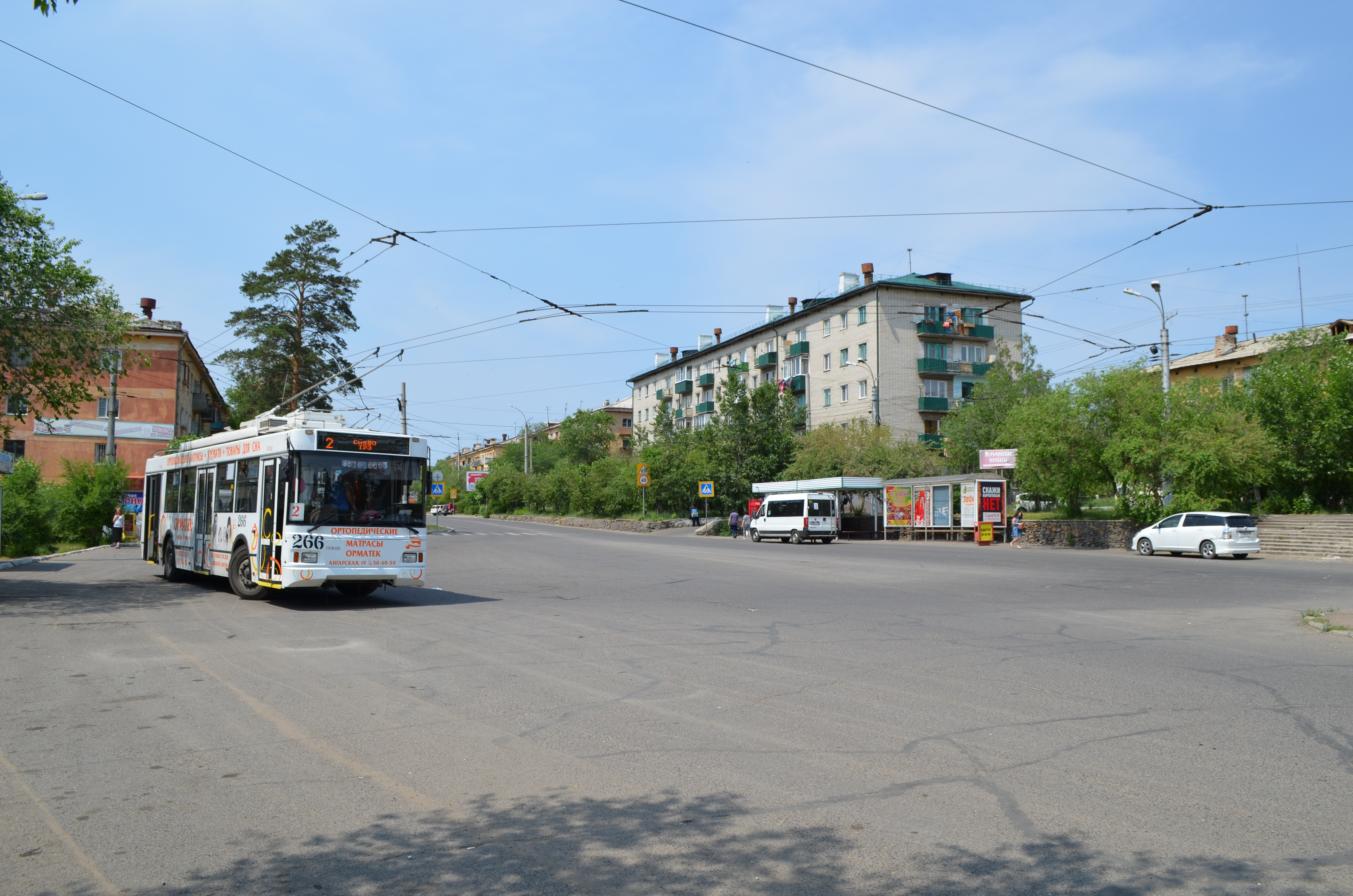 Снимки конца июня - начала июля 2015 г. Конечная остановка троллейбусов "СибВО".